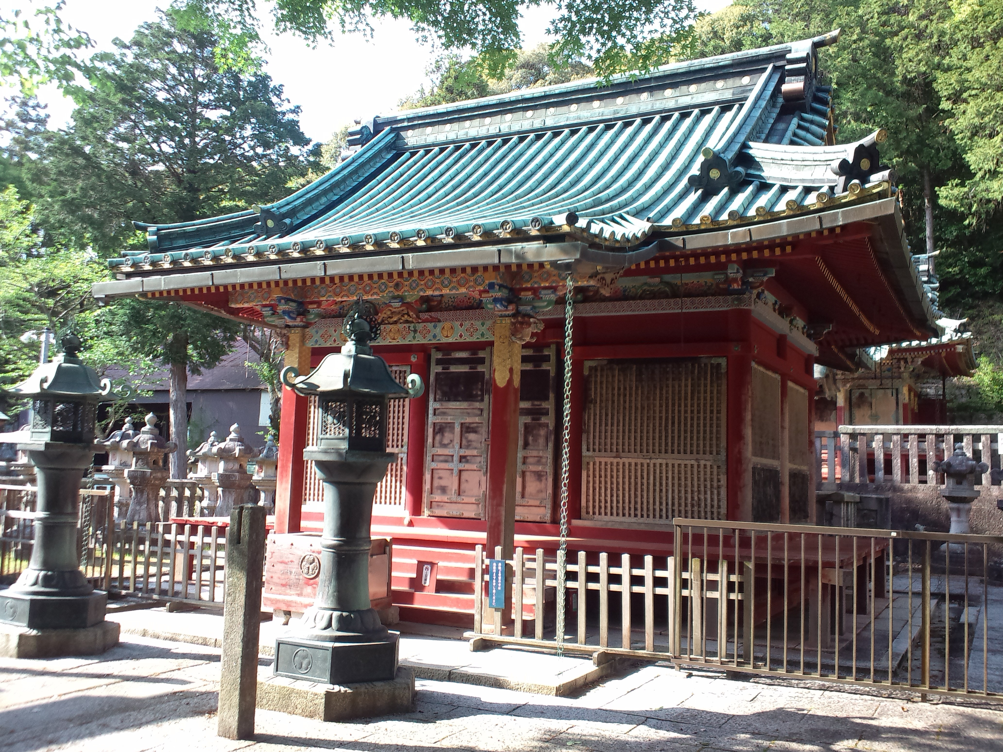 滝山東照宮 拝殿